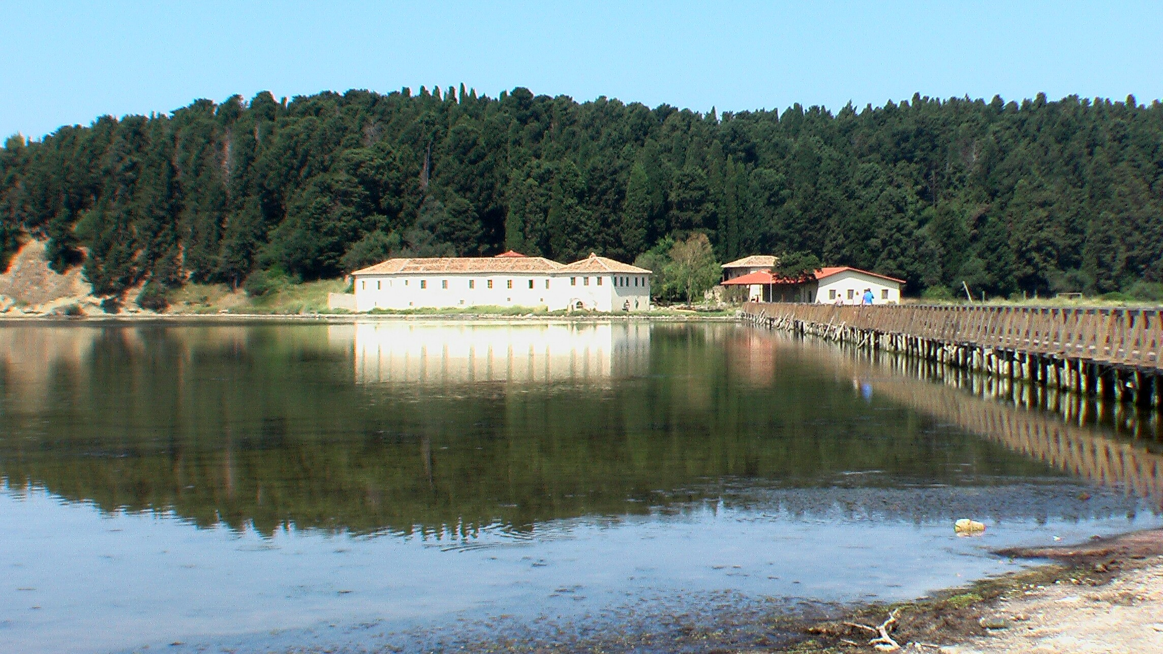 Lagune von Narta KlosterVonZvernec1